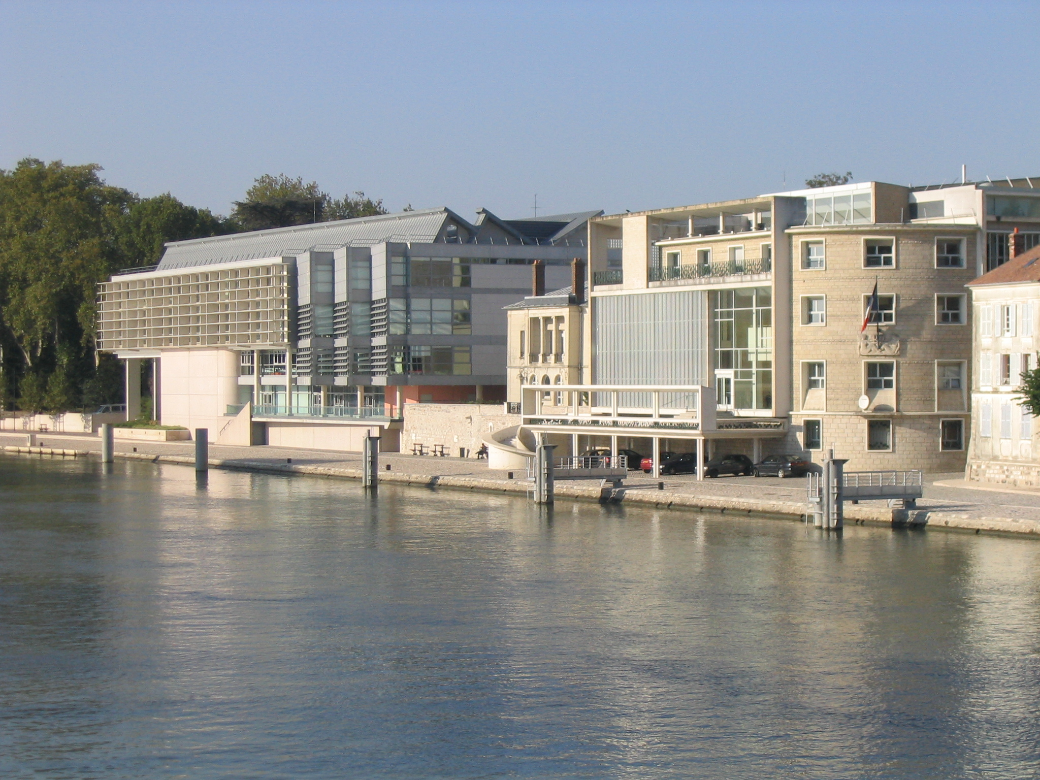 Le quai de la Reine Blanche, où se trouvent: la médiathèque de Melun(nommée L'Astrolabe), à gauche; l'antenne melunaise de l'Université Panthéon Assas PARIS 2, à droite. Photographie prise depuis le quai Hipployte Rossignol.